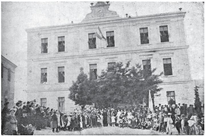 Българското училище в Горно Върбени.